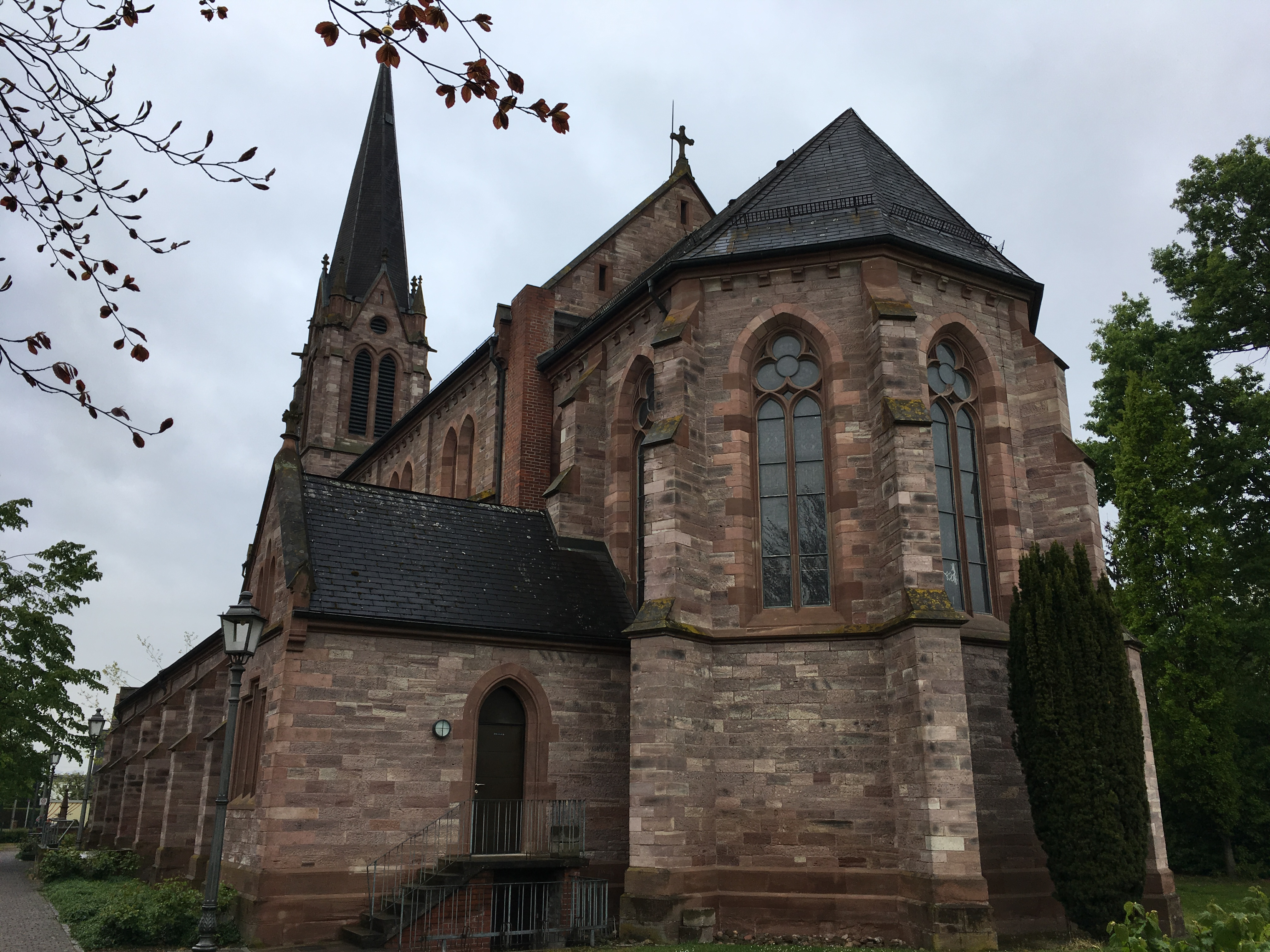 Die Pfarrkirche St. Johannes im Vimbuch ist eine neugotische, römisch-katholische Kirche in Bühl in Baden-Württemberg. Sie entstand in den Jahren 1888 bis 1891. In ihrem Innern steht unter anderem ein Altarretabel des elsässischen Bildhauers Niklaus von Hagenau aus dem Jahr 1508.